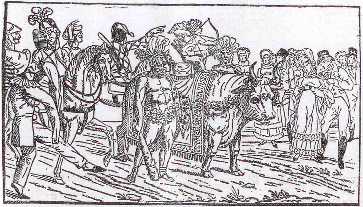 Image décorant le placard de l'"Ordre et la Marche du Bœuf Gras" 1816, conservé au musée Carnavalet à Paris, reproduite en première page du journal "La Presse" du 23 mars 1927.